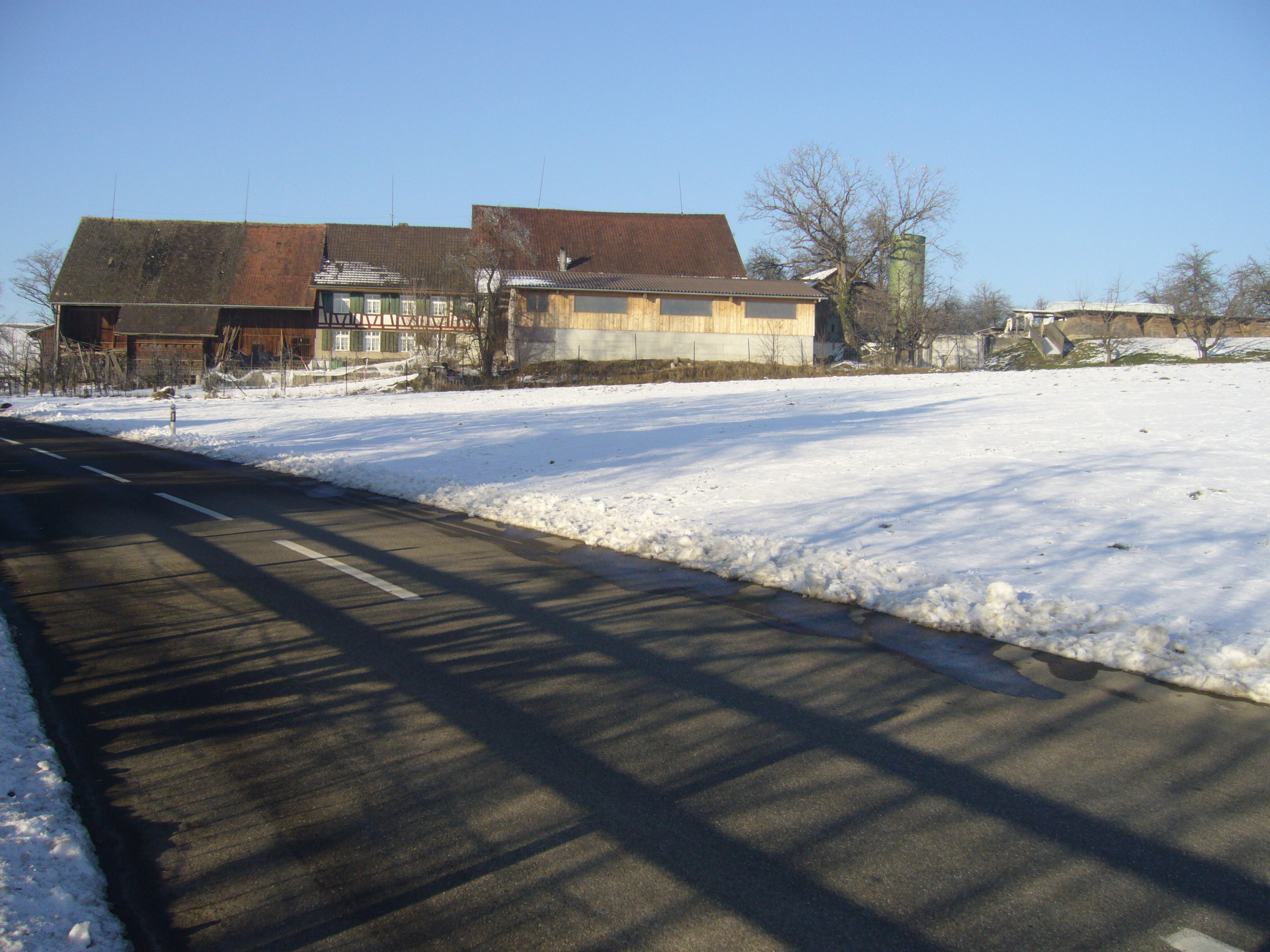 Bauernhof zu Vorderhalingen.